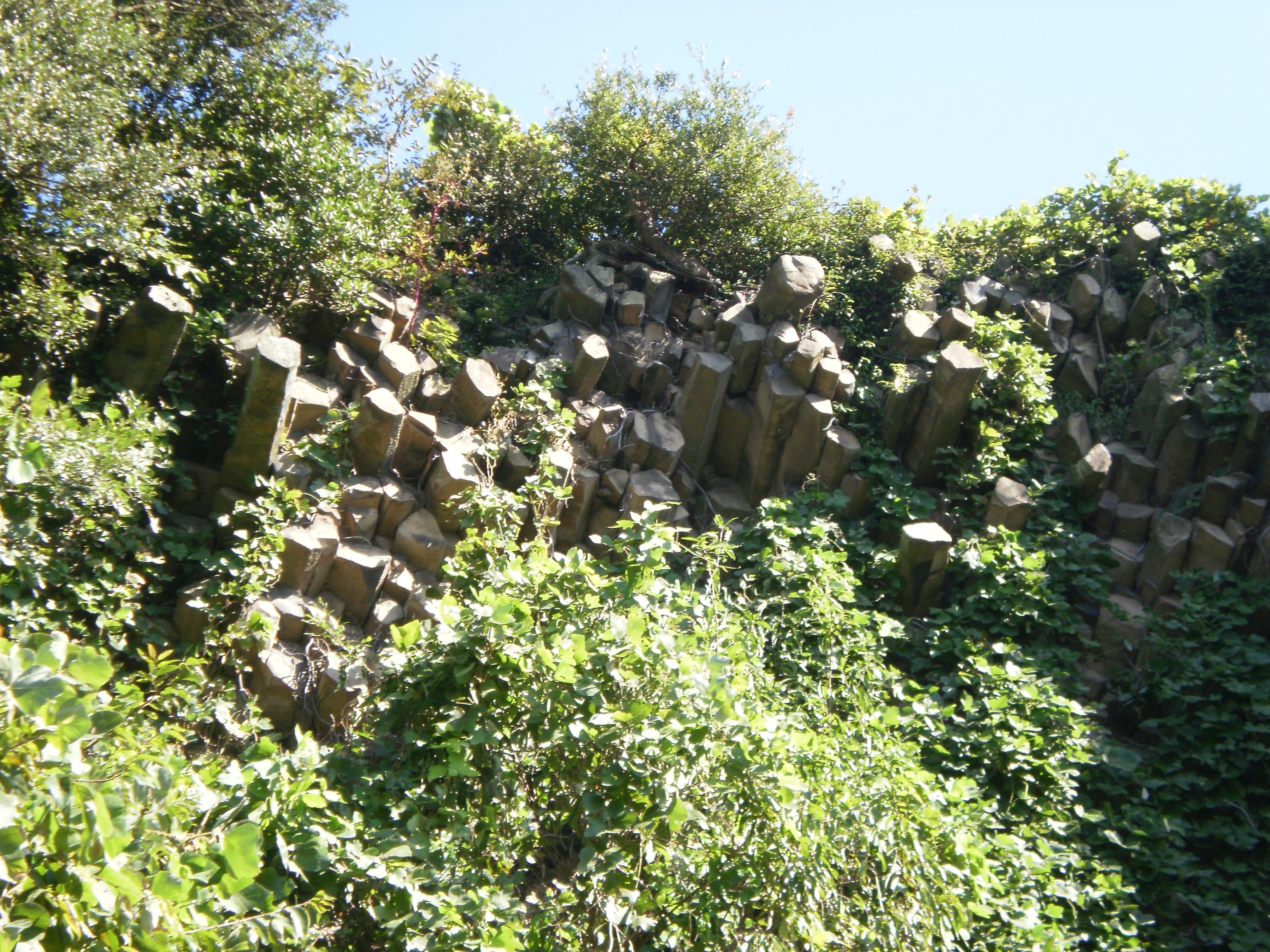 女木島 010